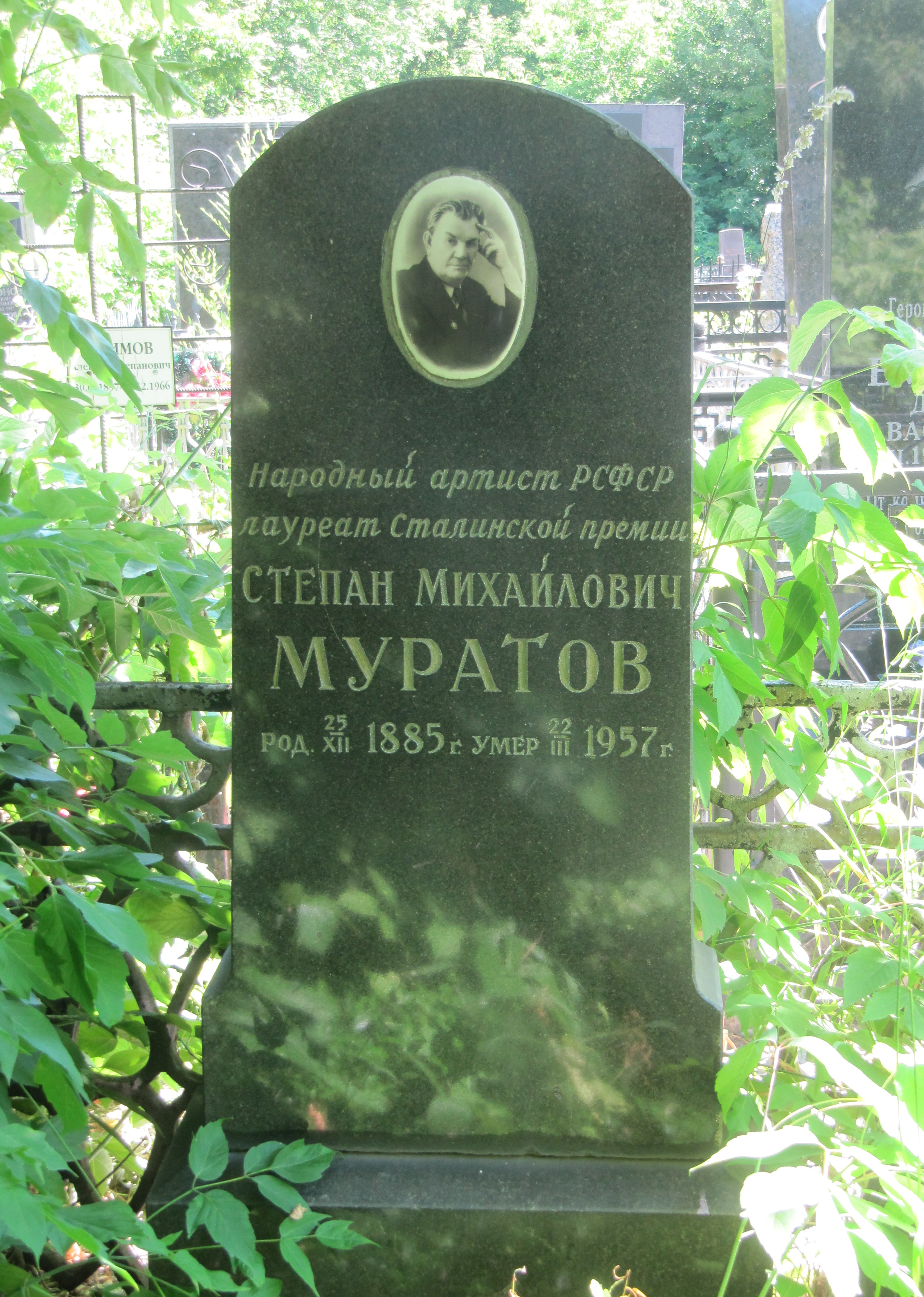 Могила Муратова С.М. (1885-1957), народного артиста РСФСР: Воскресенское кладбище (1й участок), Саратов, Саратовская область.